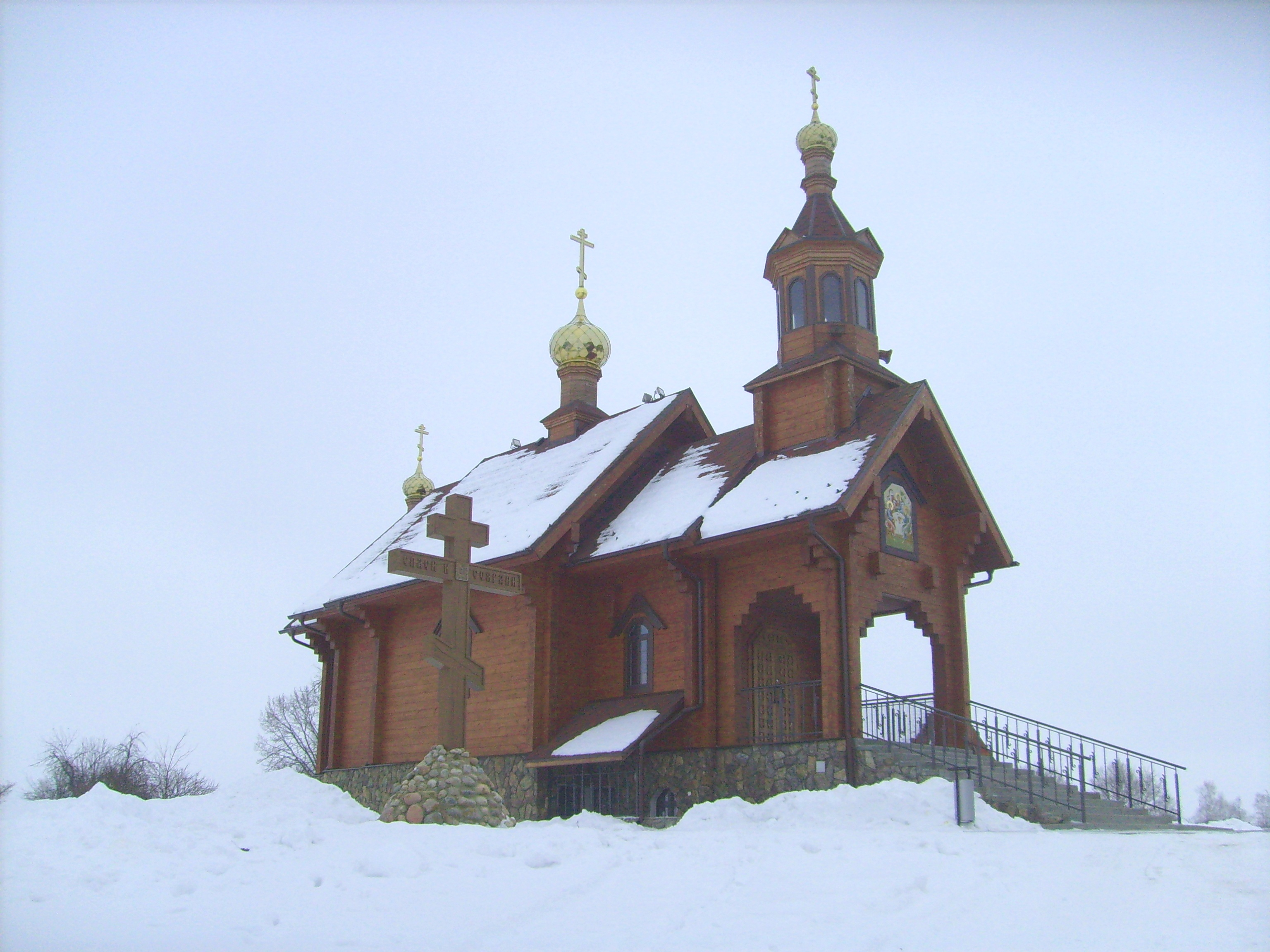 Храм в честь Святой Троицы в агрогородке Головчин (Белыничский район)